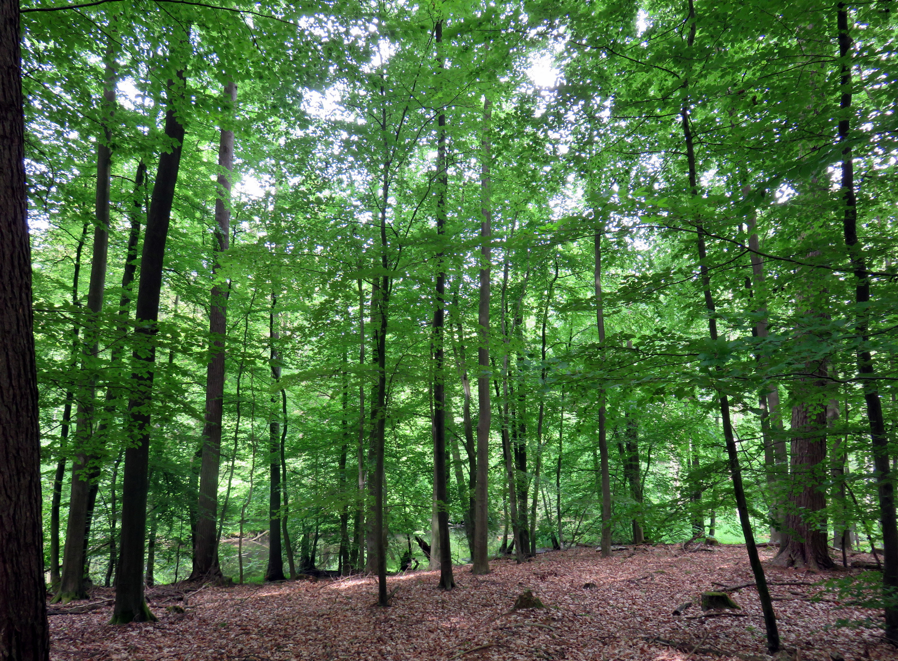 Buchenwald im Naturschutzgebiet Wohldorfer Wald in Hamburg-Wohldorf-Ohlstedt.